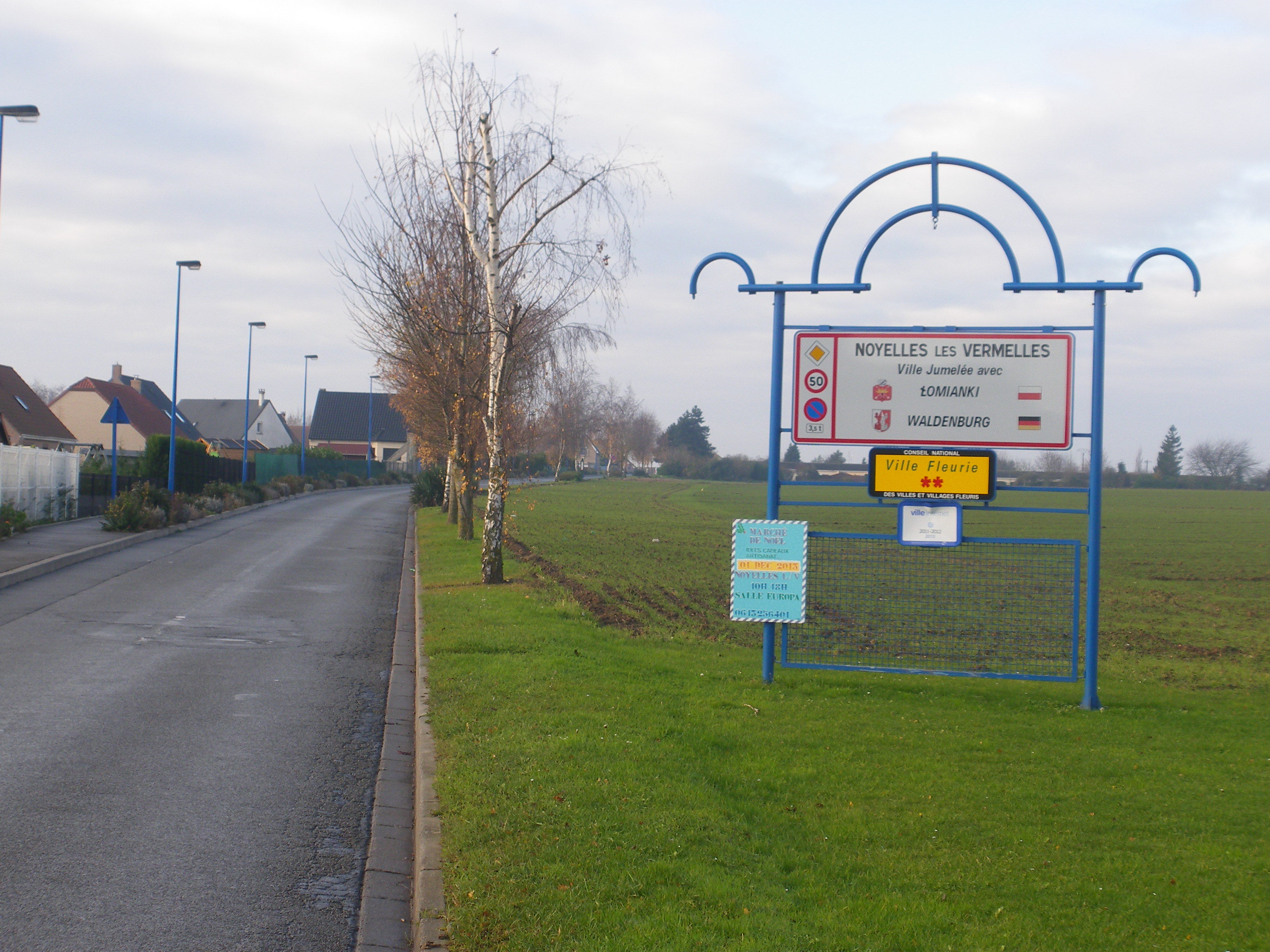 Panneau d'entrée de la commune de Noyelles-lès-Vermelles.